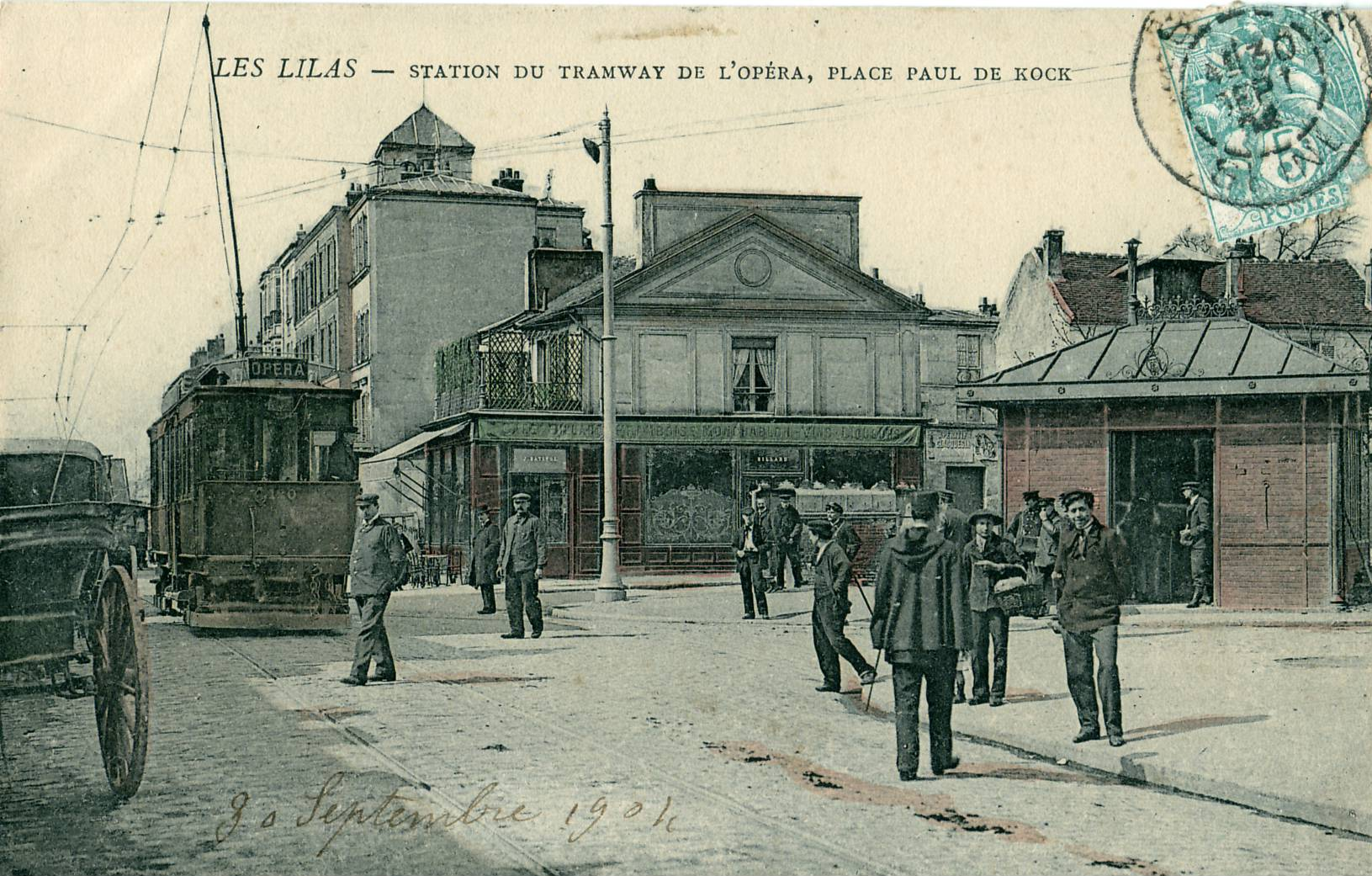 Carte postale ancienneLES LILAS : Station du tramway de l'Opéra, Place Paul de Kock